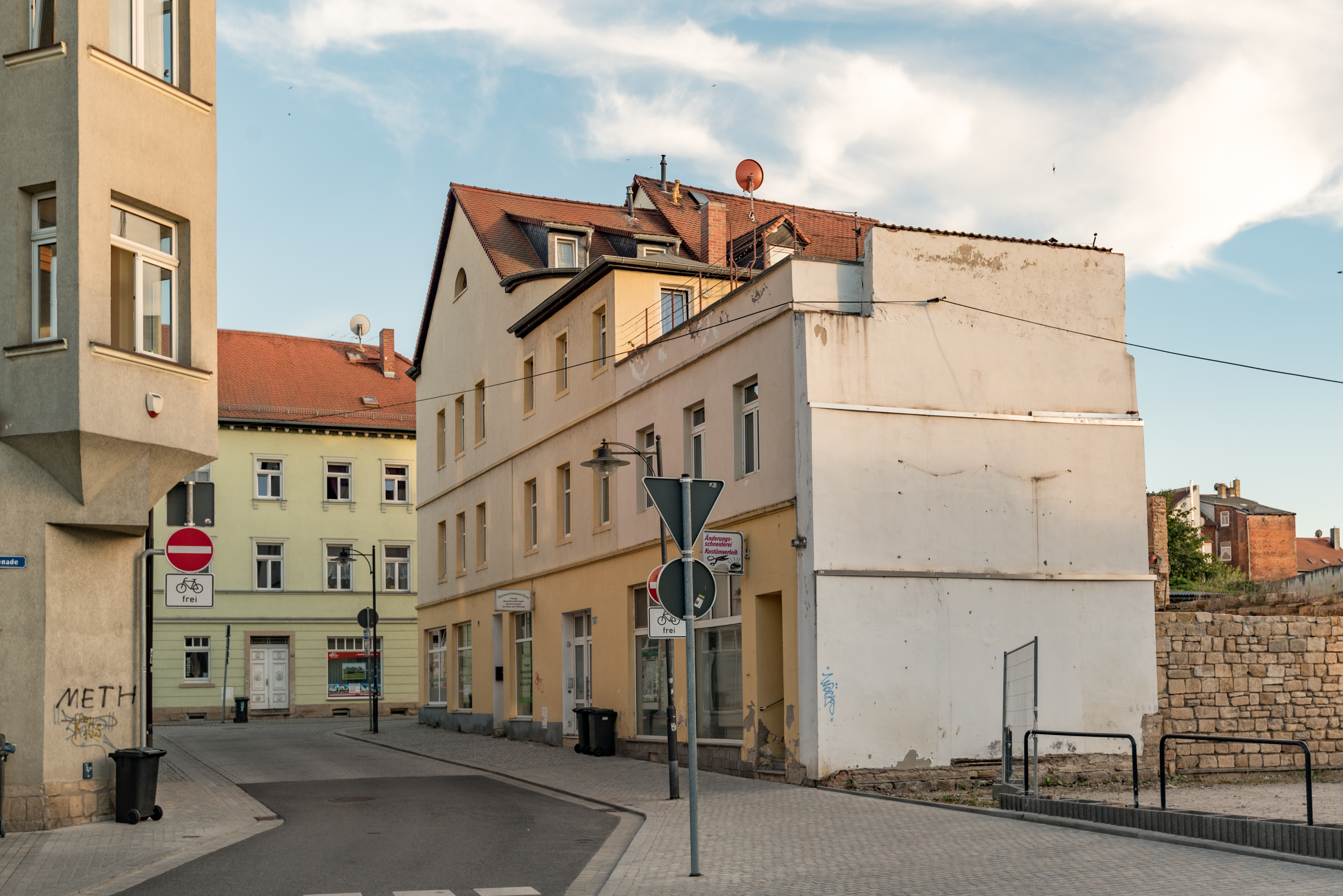 Weißenfels, An der Pforte 2